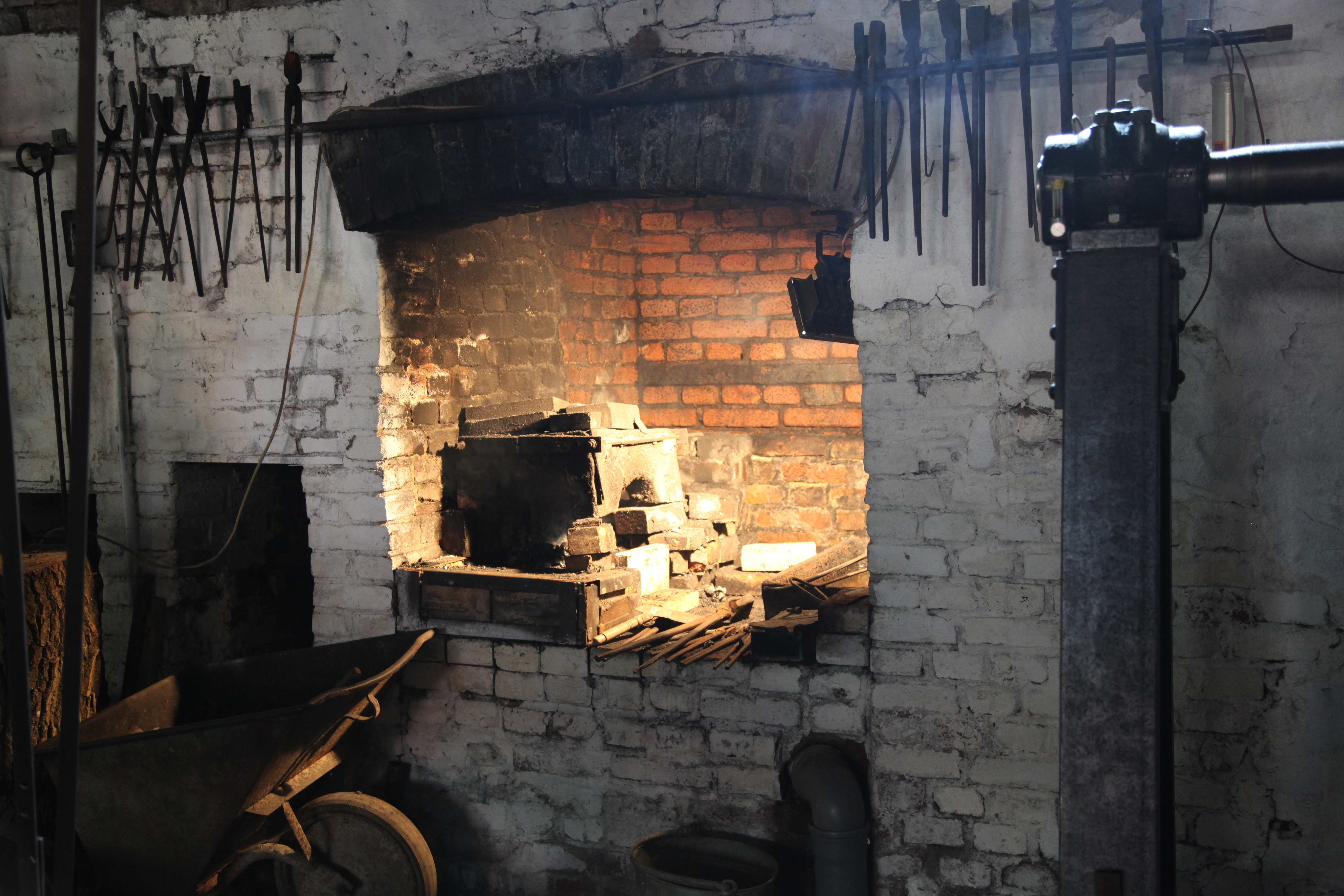 Rekonstruiertes Hammerwerk mit Werkstatt im Schleiper Hammer in Kierspe-Schleipe am deutschen Mühlentag 2012